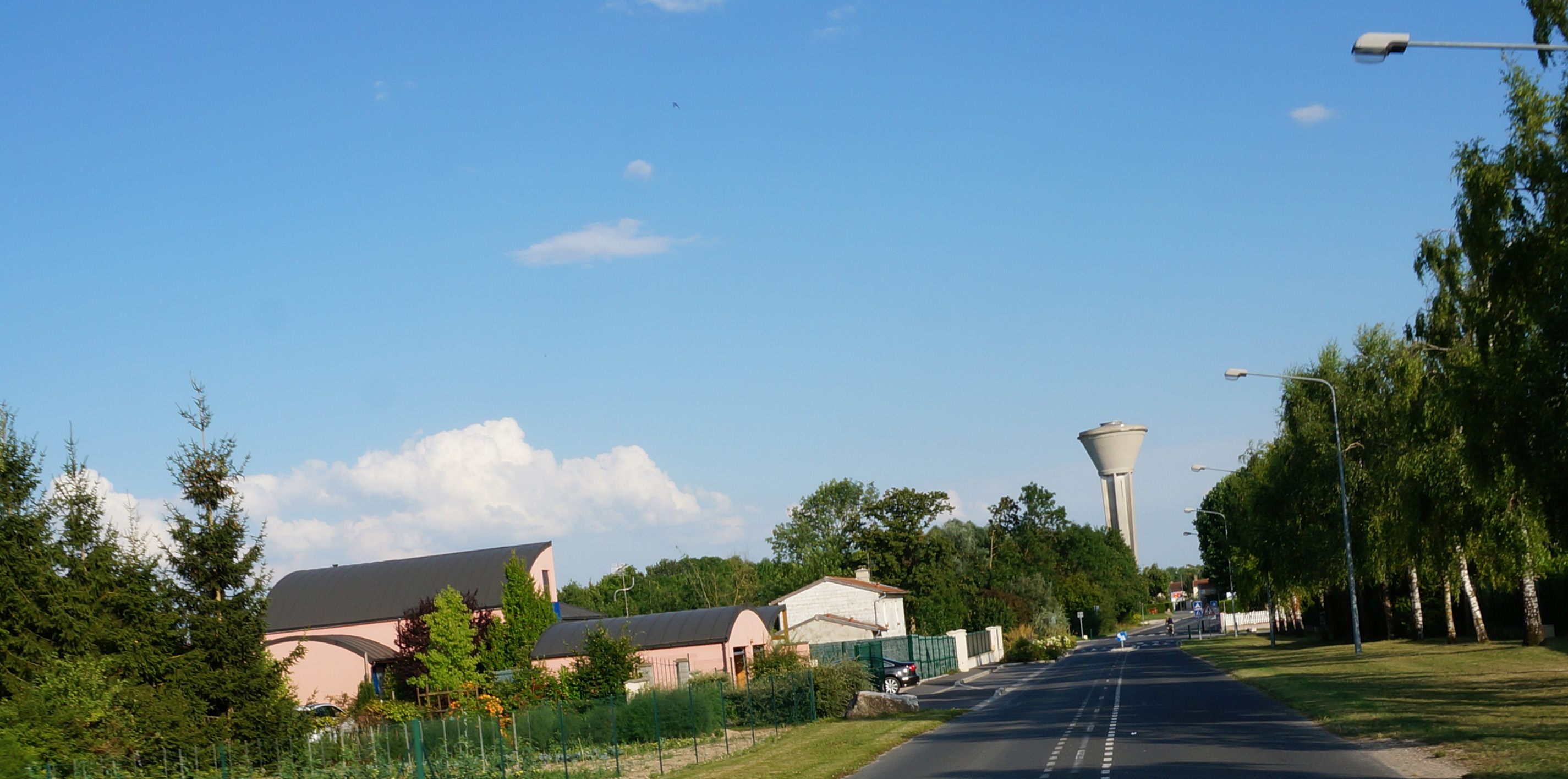 Village de Recy dans la Marne avec son château d'eau.